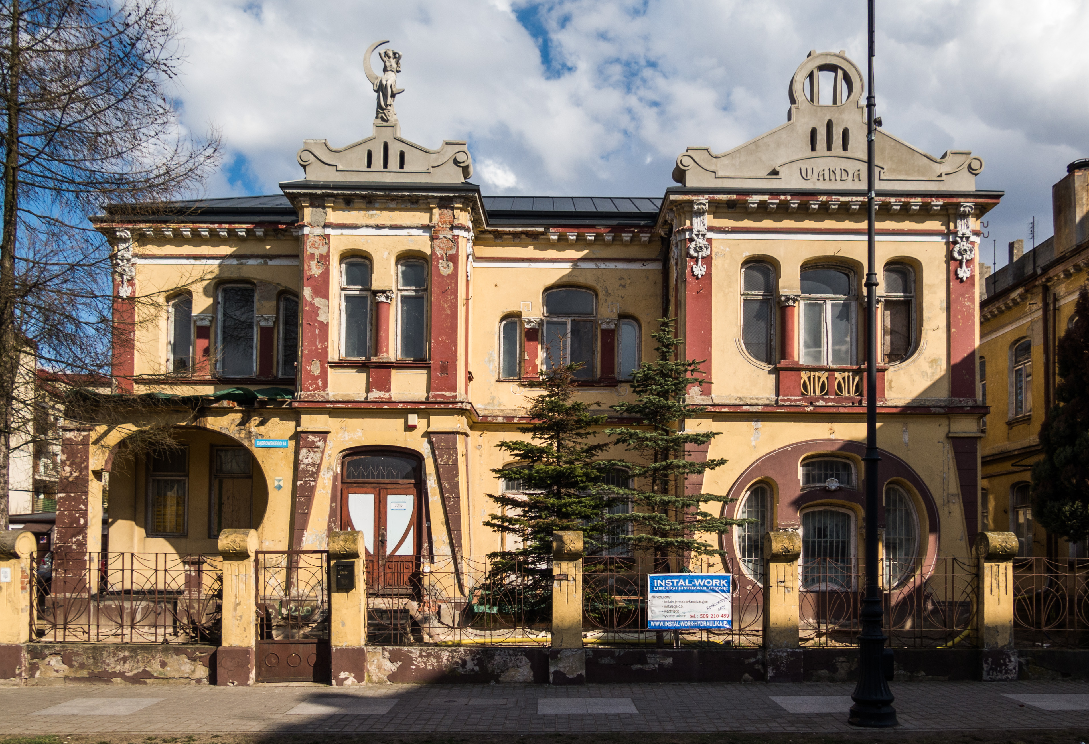 Willa Wanda w Piotrkowie Trybunalskim, ul. Dąbrowskiego 14, secesja, 1905 r., proj. Feliks Nowicki.